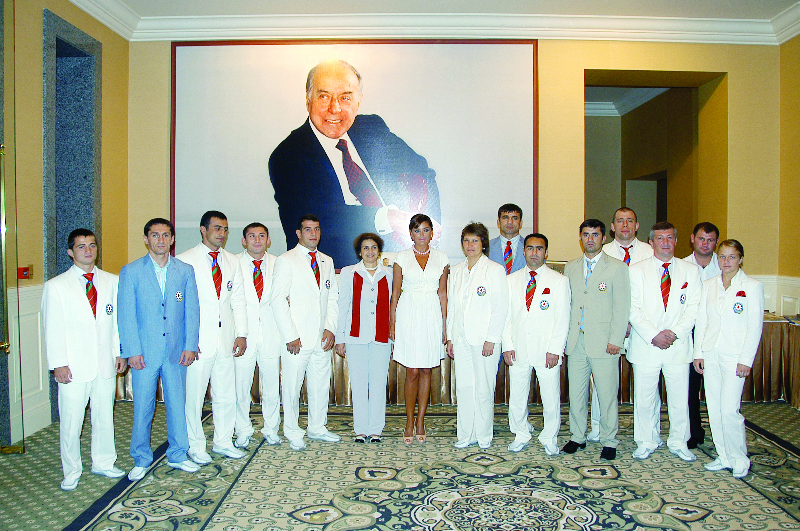 Olimpiya oyunlarında medal qazanmış Azərbaycan idmançıları Heydər Əliyev Fondunun aylıq təqaüdlərinə və diplomlarına layiq görülüblər.